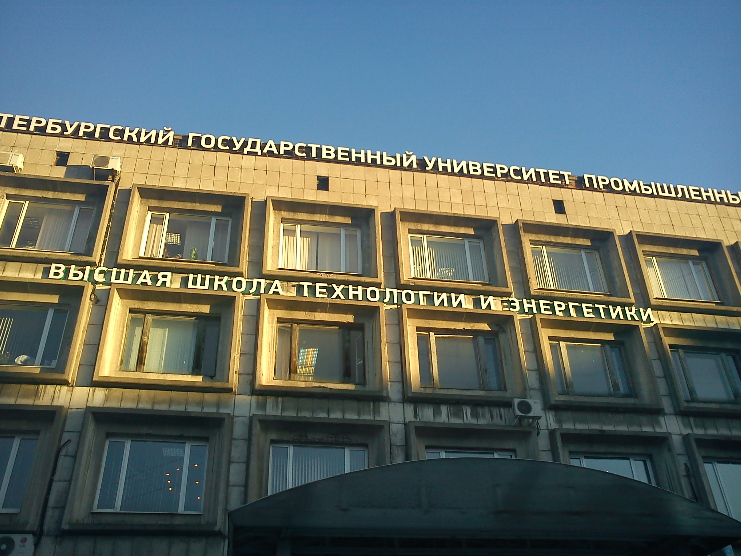 Высшая школа технологии и энергетики (бывш. СПбГТУРП)